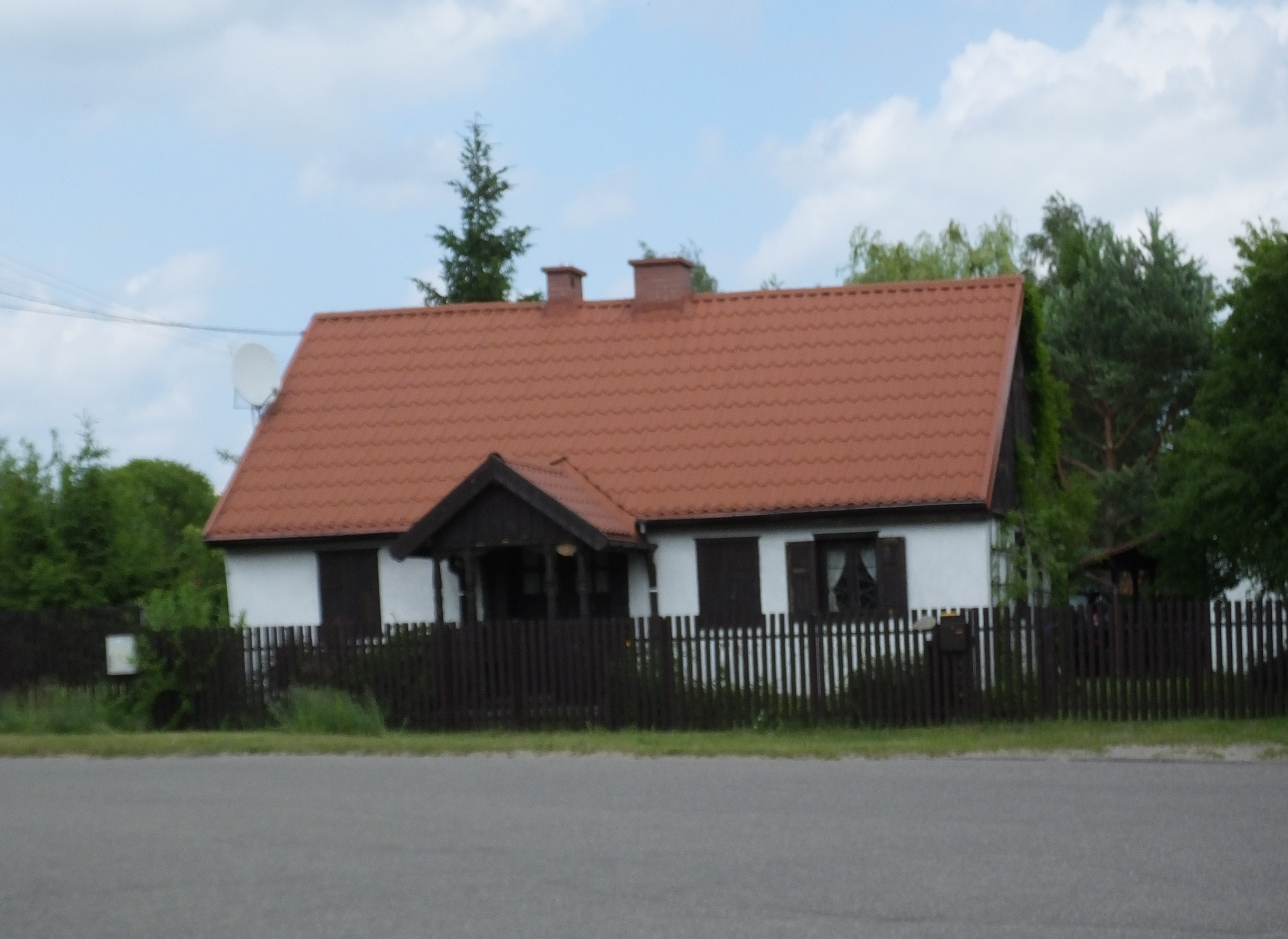 Krzyże w gminie Ruciane-Nida